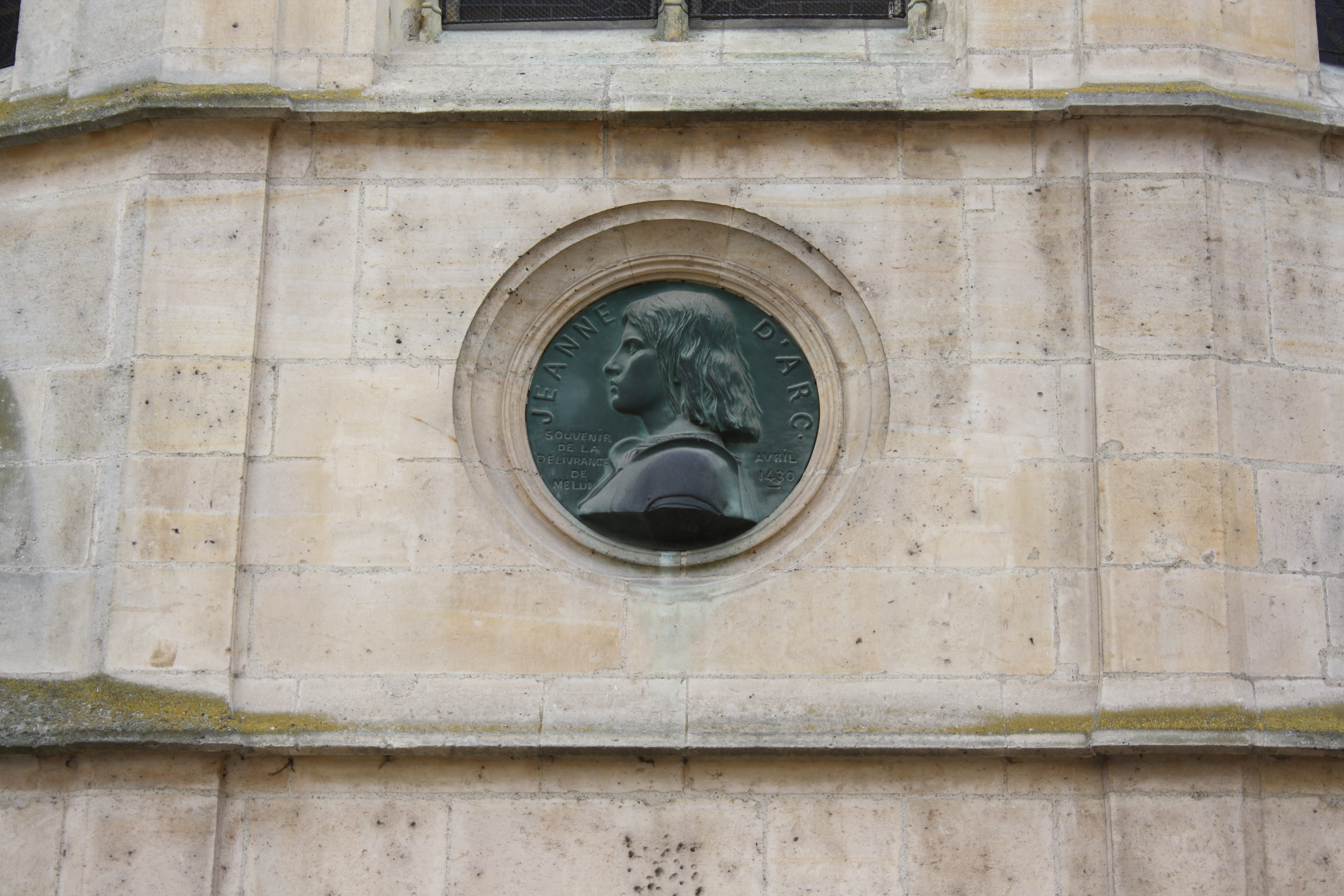 Katholische Pfarrkirche Saint-Aspais in Melun im Département Seine-et-Marne in der Region Île-de-France (Frankreich), Medaillon aus Bronze an der Außenmauer der Kirche, Darstellung: Johanna von Orléans